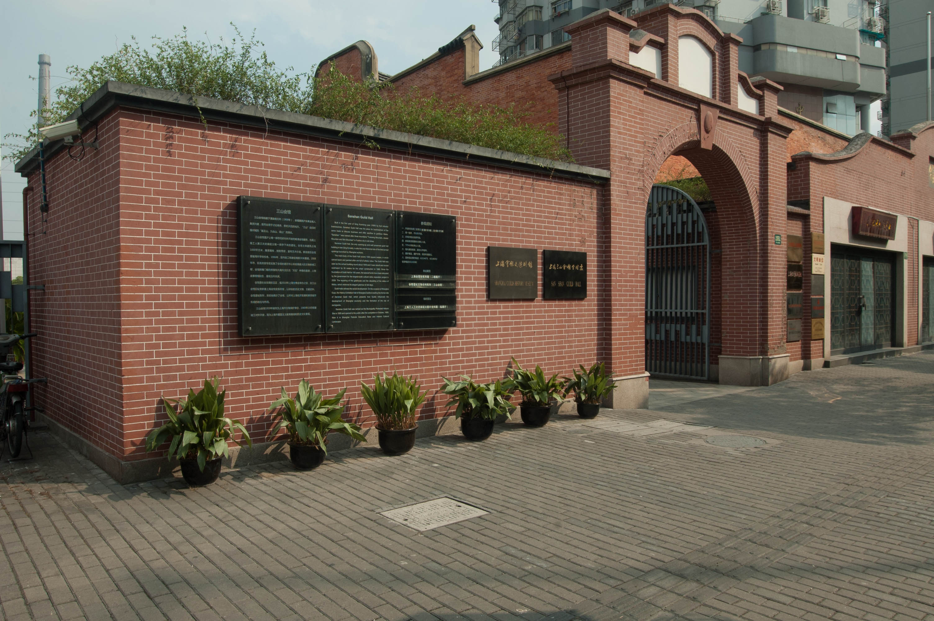 上海三山会馆管理处